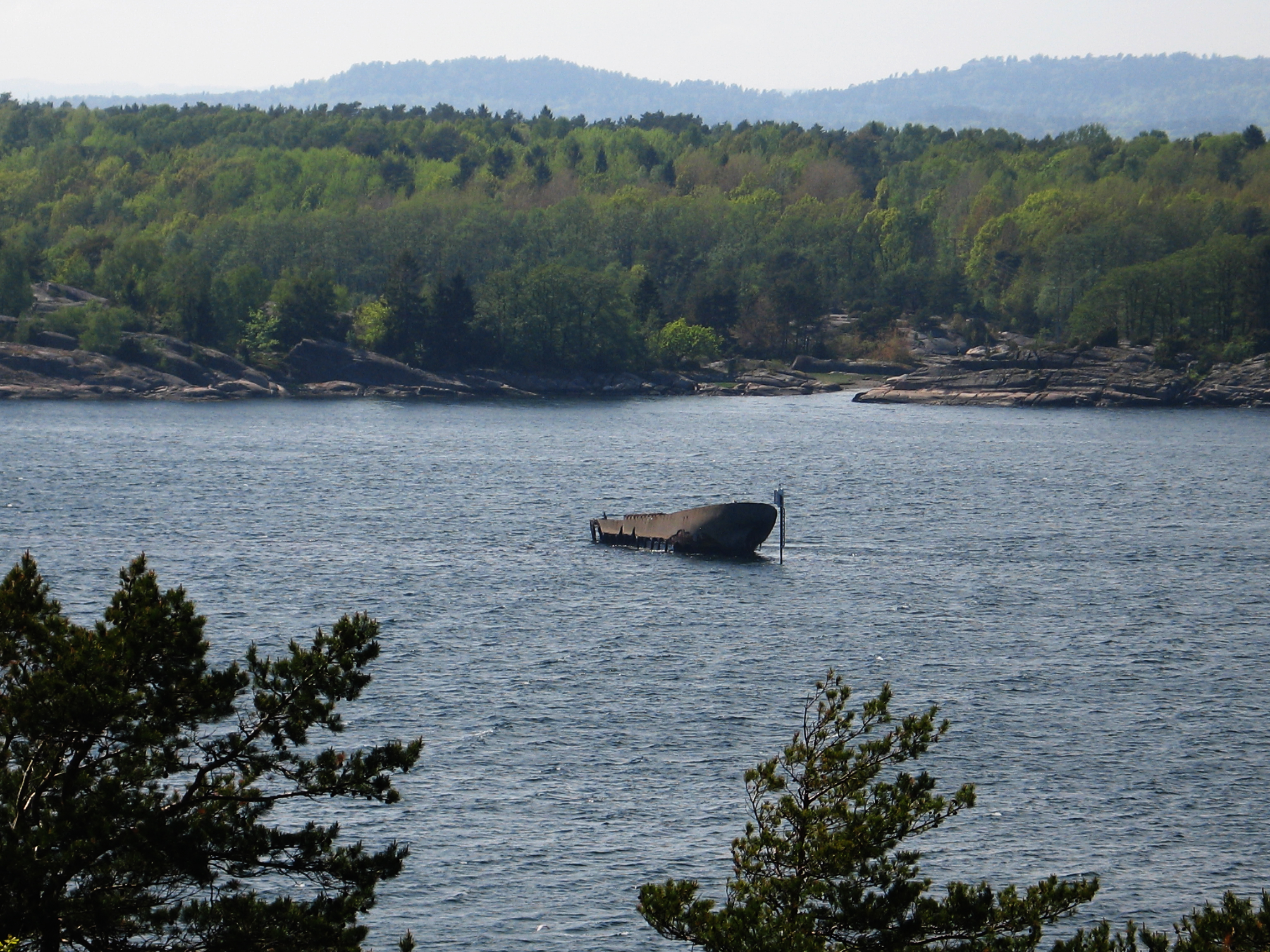 Skipsvrak på Svartskjærbåen vest for Tjøme. Sementbåten "M/S Silvestre" gikk på grunn på vei fra Son til Kragerø i ballast. Vraket ligger delvis på Svartskjærbåen og er synlig over vann